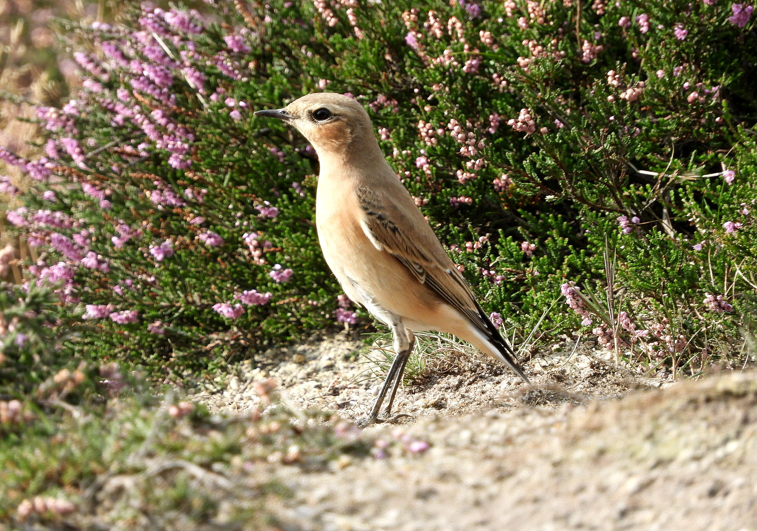 Steinschmätzer in der Kirchdorfer Heide